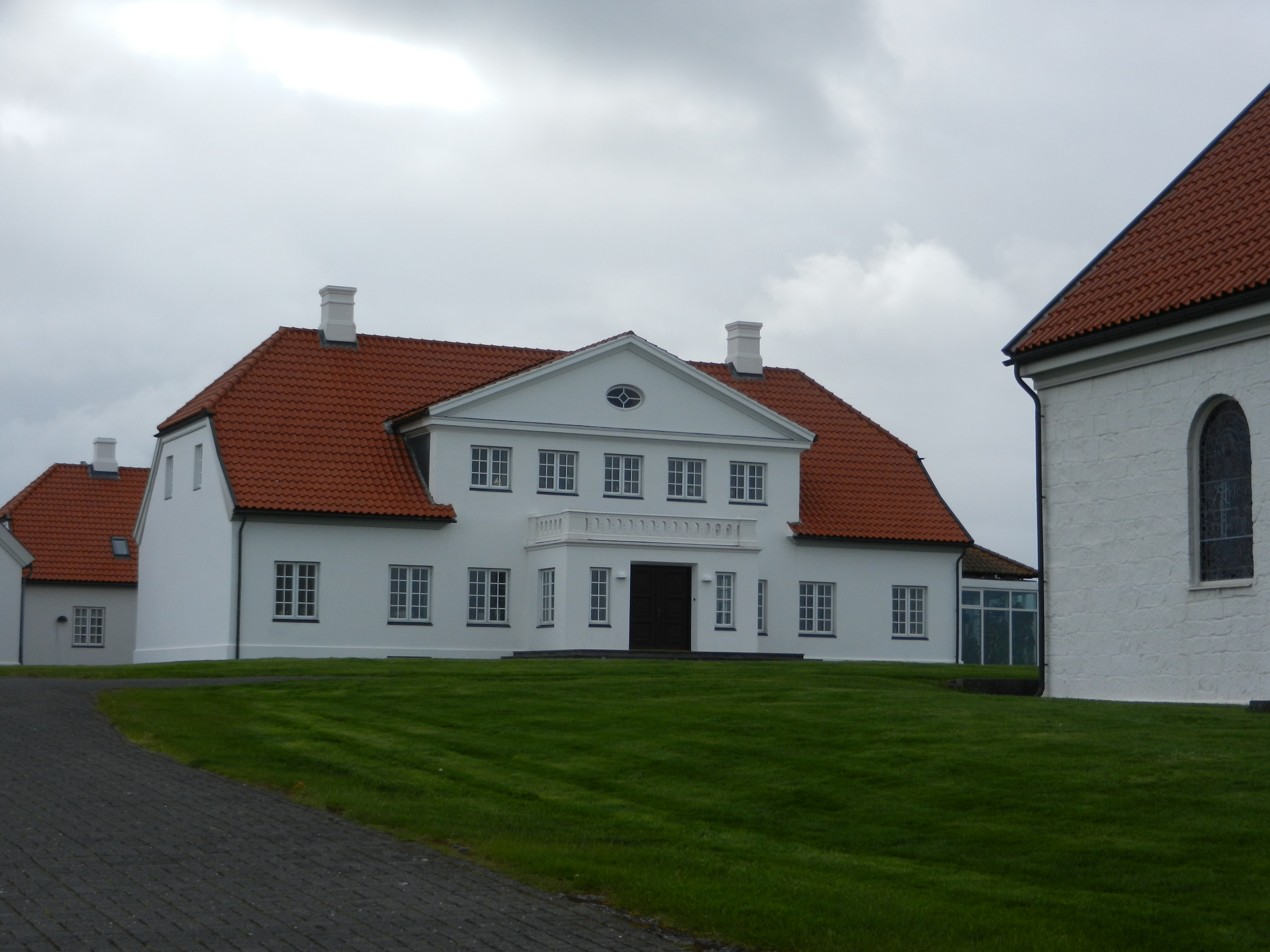 Bessastaðir, predsednikova rezidenca v Reykjaviku, Islandija.